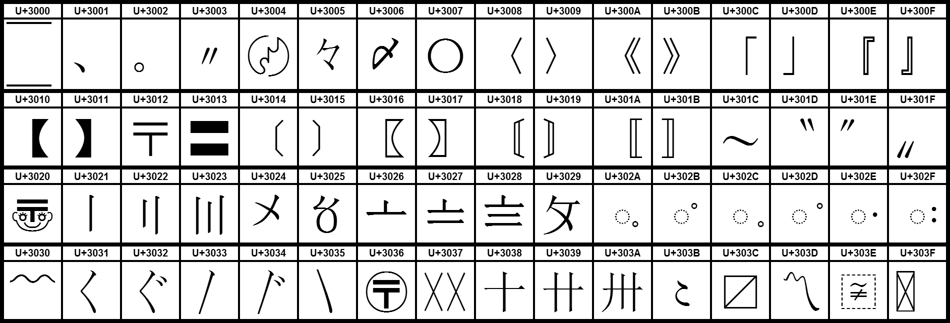 Grafiktafel für den Unicodeblock CJK-Symbole und -Interpunktion.